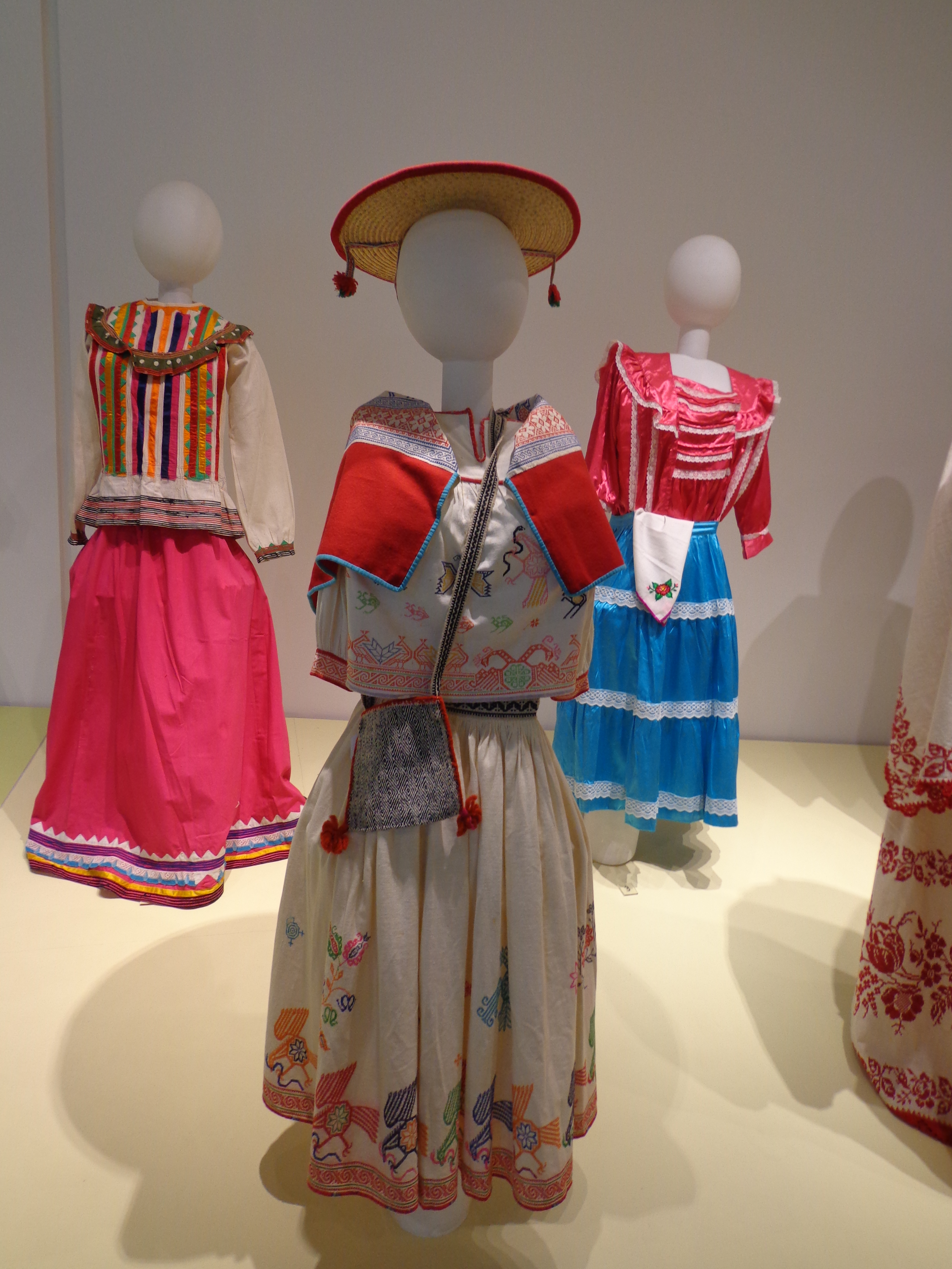 Trajes mexicanos en el map